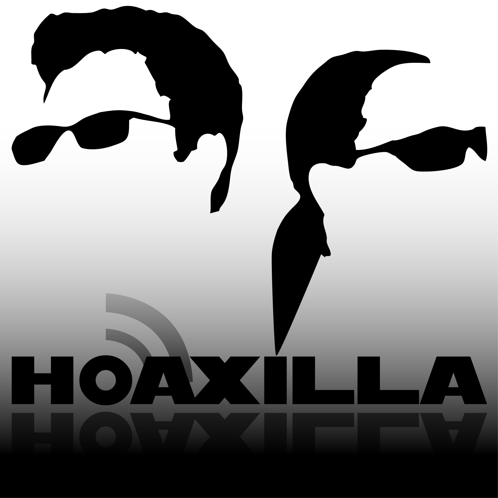 Logo des Podcasts Hoaxilla